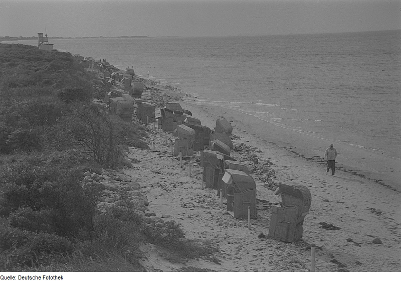 Original image description from the Deutsche Fotothek Strand auf Hiddensee